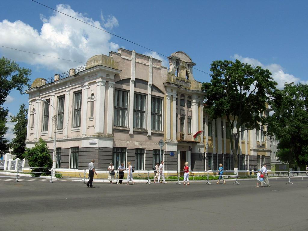 Беларуская (тарашкевіца): Будынак колішняй земскай управы ў стылі мадэрн (1909)